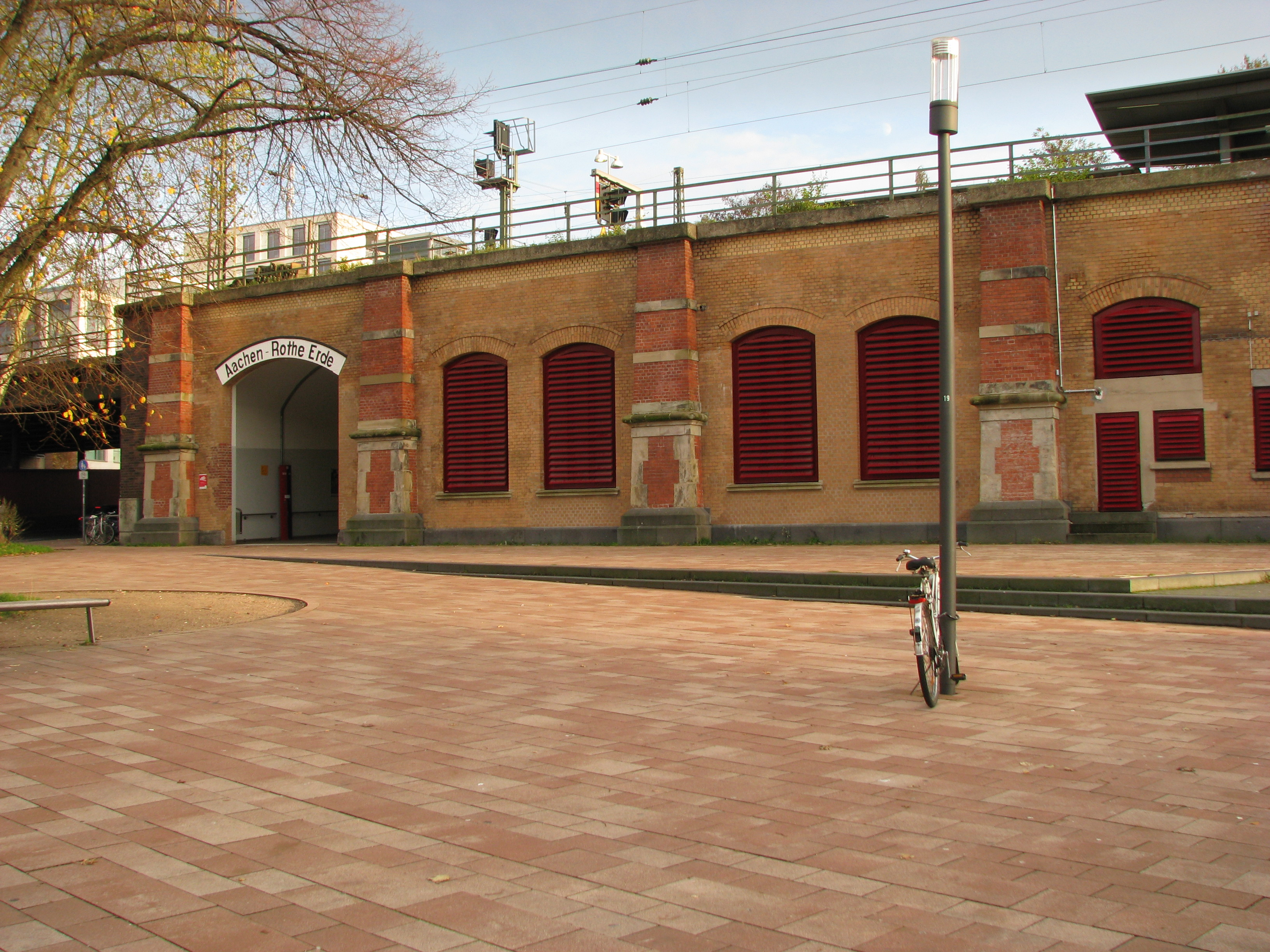 Neu gestalteter Bahnhofsvorplatz und renovierte Fassade des Bahnhofs Aachen-Rothe Erde im November 2013. In den 1960er Jahren wurde die Fassade im oberen Bereich mit gelben Ziegeln erneuert. Diese Ziegel stammten von der abgerissenen „Gelben Kaserne“ (heute Kennedypark) und heben sich bis heute farblich deutlich von den ursprünglichen Ziegeln ab.